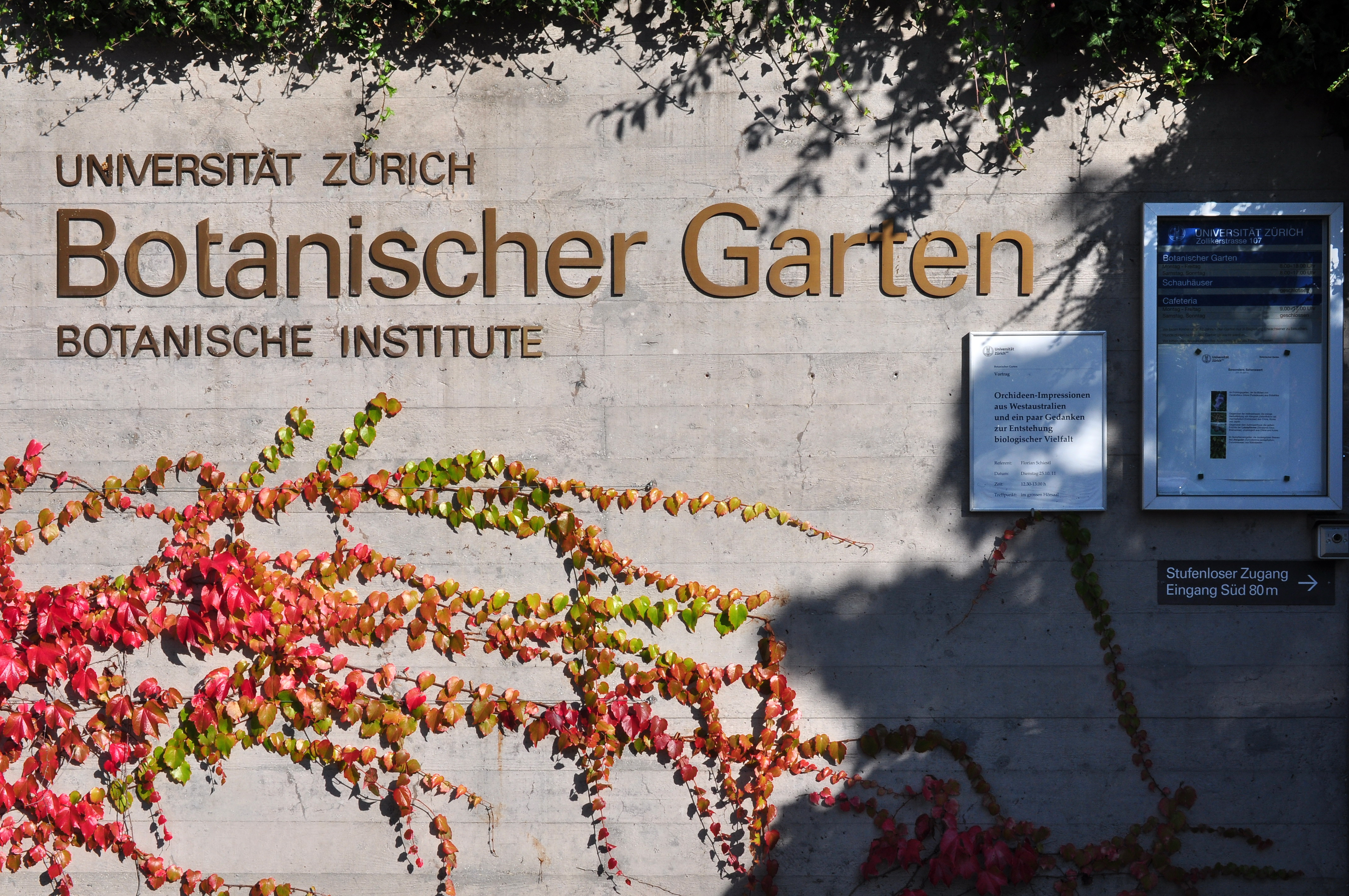 Botanischer Garten der Universität Zürich in Zürich-Weinegg (Switzerland)